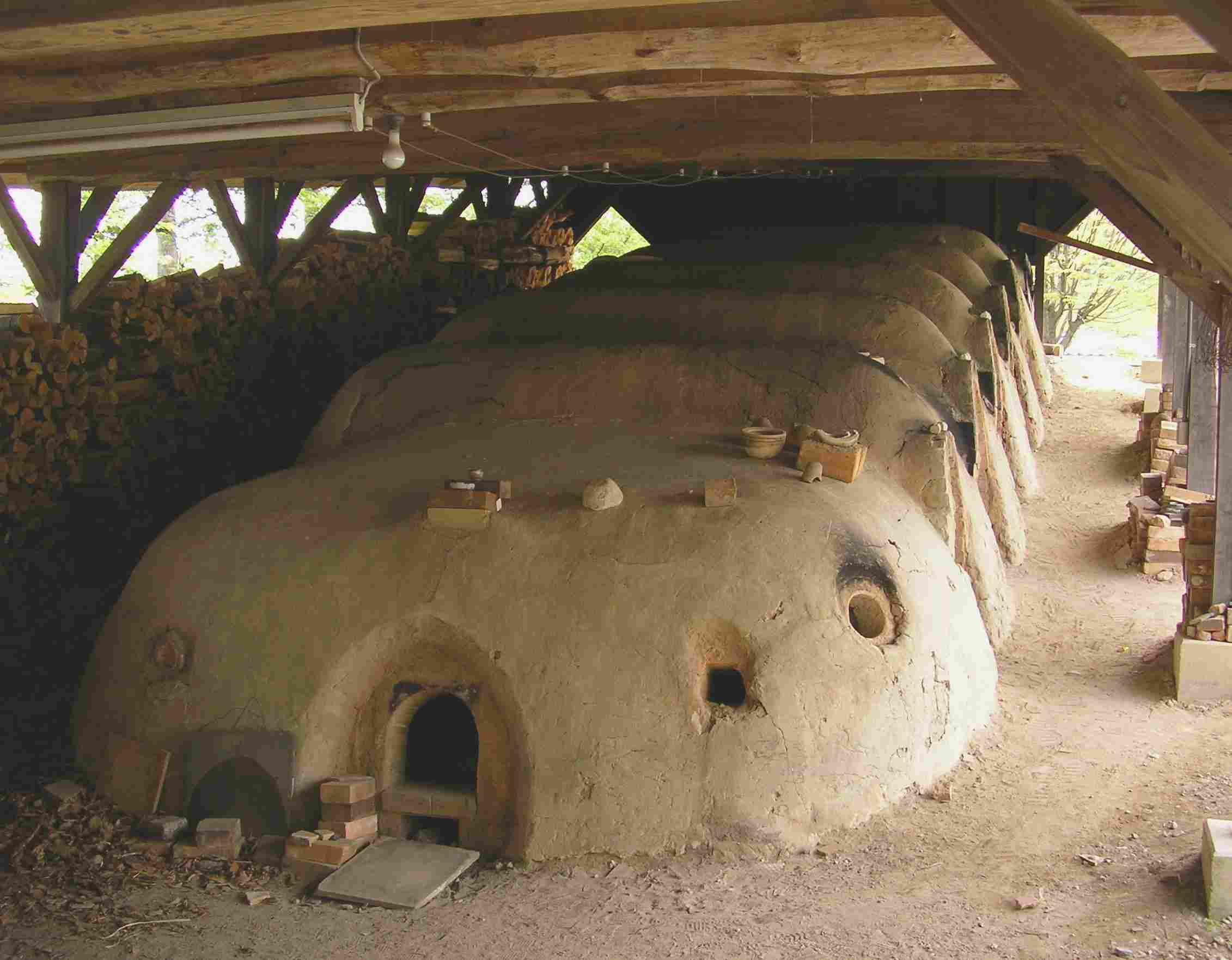 登り窯（益子焼）。栃木県ja:益子町内・陶芸メッセ益子にて。2006年5月、投稿者撮影。